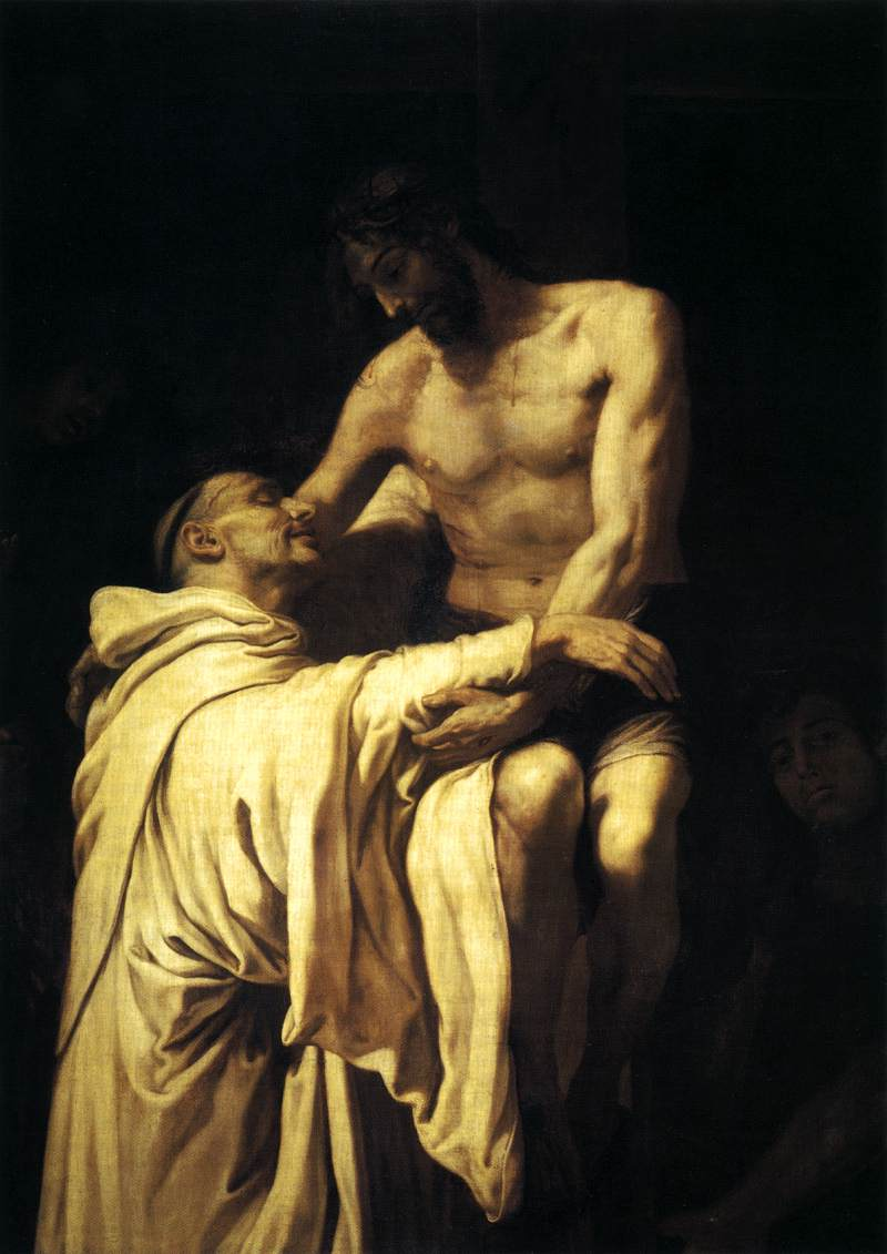 La obra representa a Jesucristo abrazando al monje cisterciense San Bernardo de Claraval.